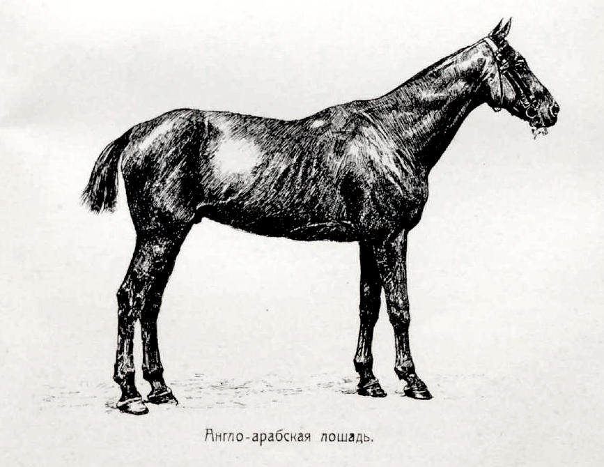 Данное изображение было использовано в статье «Англо-арабская лошадь» опубликованной во втором томе «Военной энциклопедии», который был издан книгоиздательским товариществом Ивана Дмитриевича Сытина в 1911 году в столице Российской империи городе Санкт-Петербурге.